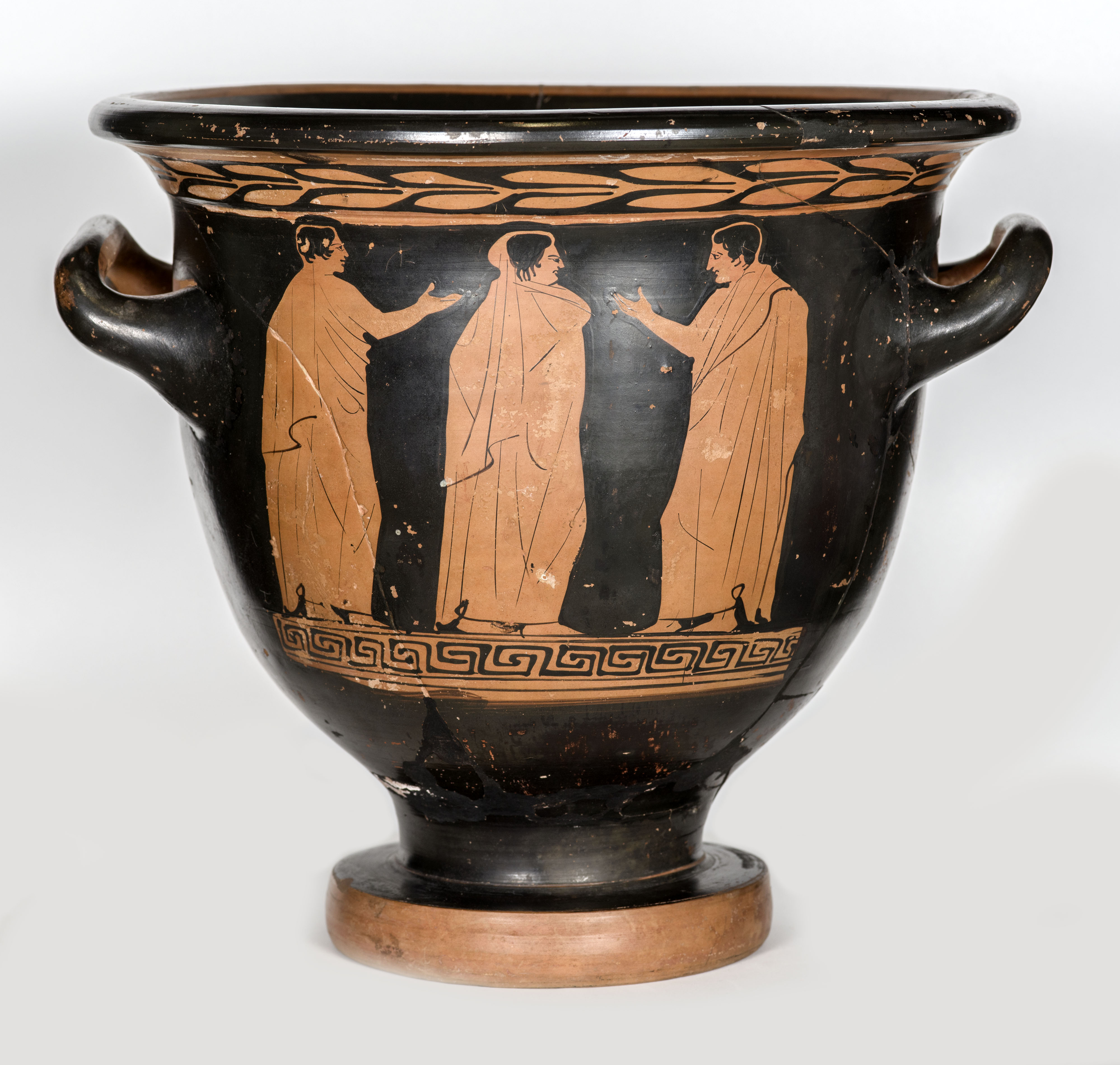 Cara B de crátera de campana con escena de tres jóvenes con himatión en una palestra. La crátera se halló en la tumba 11 localizada en la zona I de la necrópolis ibérica de Tútugi, Galera (Granada). Altura: 27 cm; diámetro boca: 29 cm; diámetro en la base del pie: 14 cm. Grupo de Polignotos. Cultura ibera. Nº inventario 1979/70/GAL/T11/2. Museo Arqueológico Nacional de ESpaña.